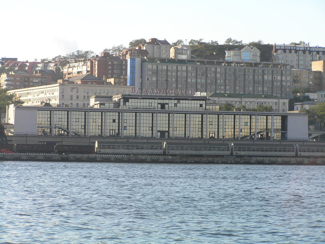 building of public port Морской вокзал, г. Владивосток